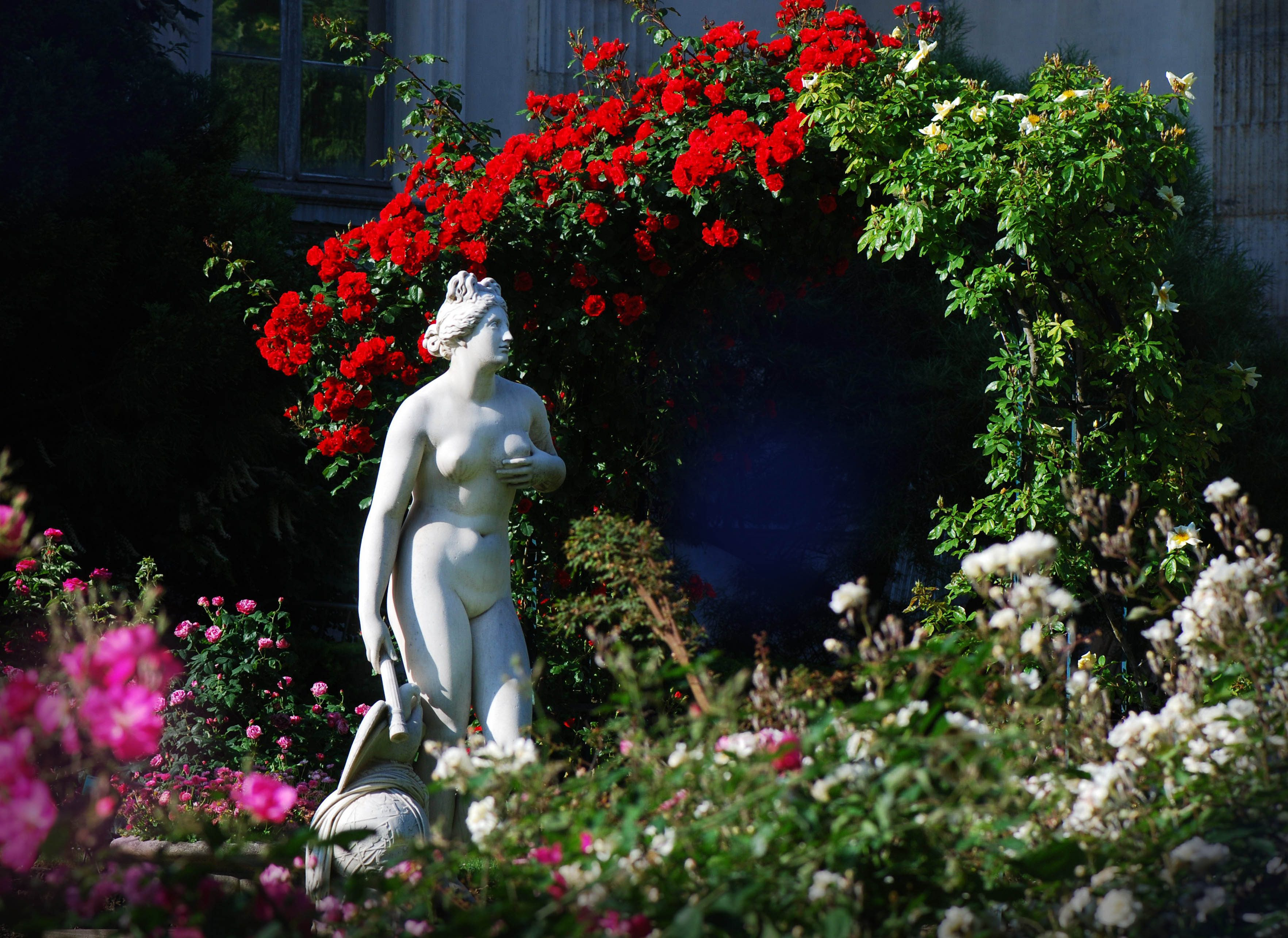 Vénus génitrice, Venus Genitrix, roseraie du Jardin des Plantes de Paris